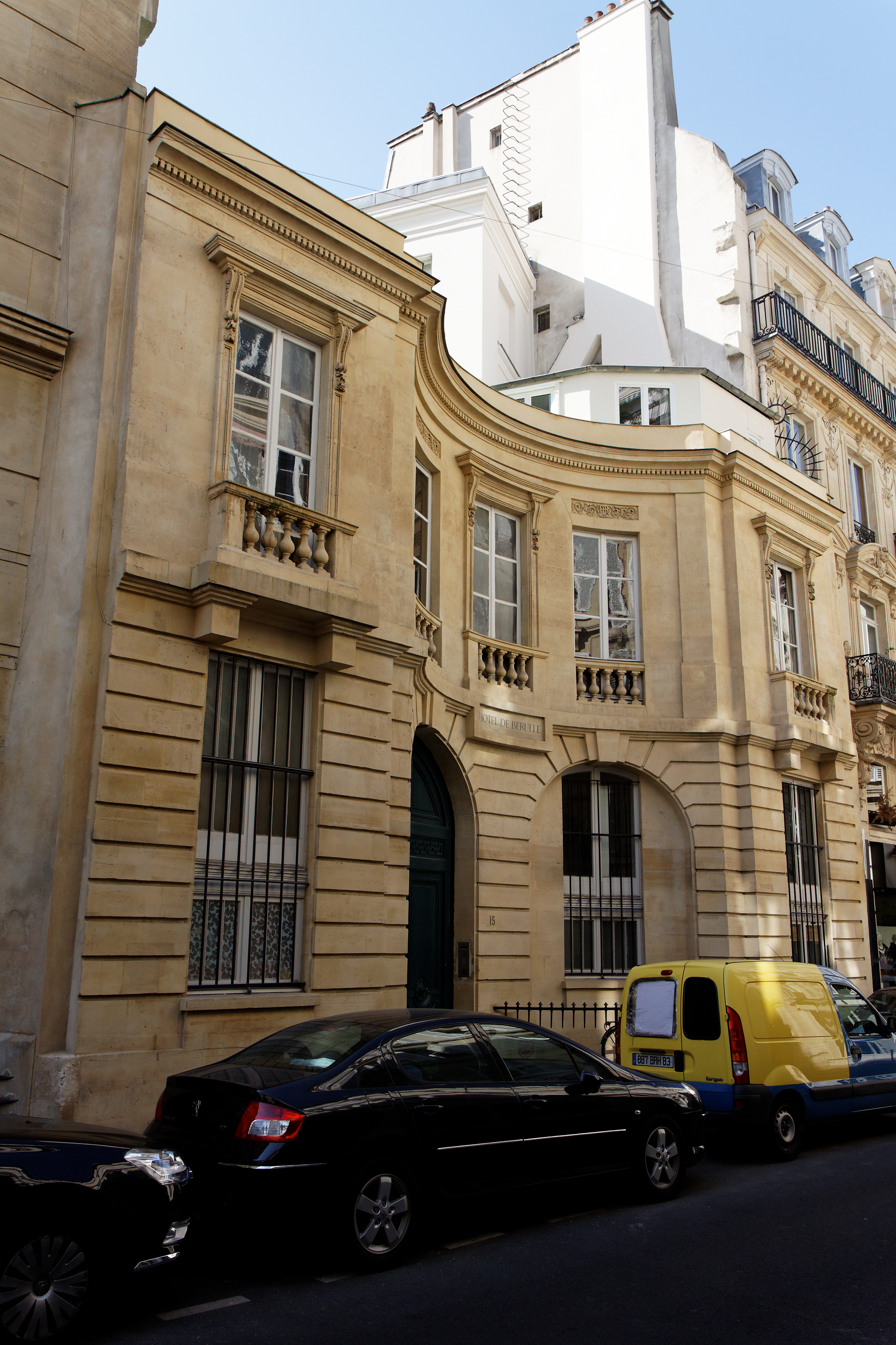 Un monument historique dans le 7ème arrondissement de Paris.